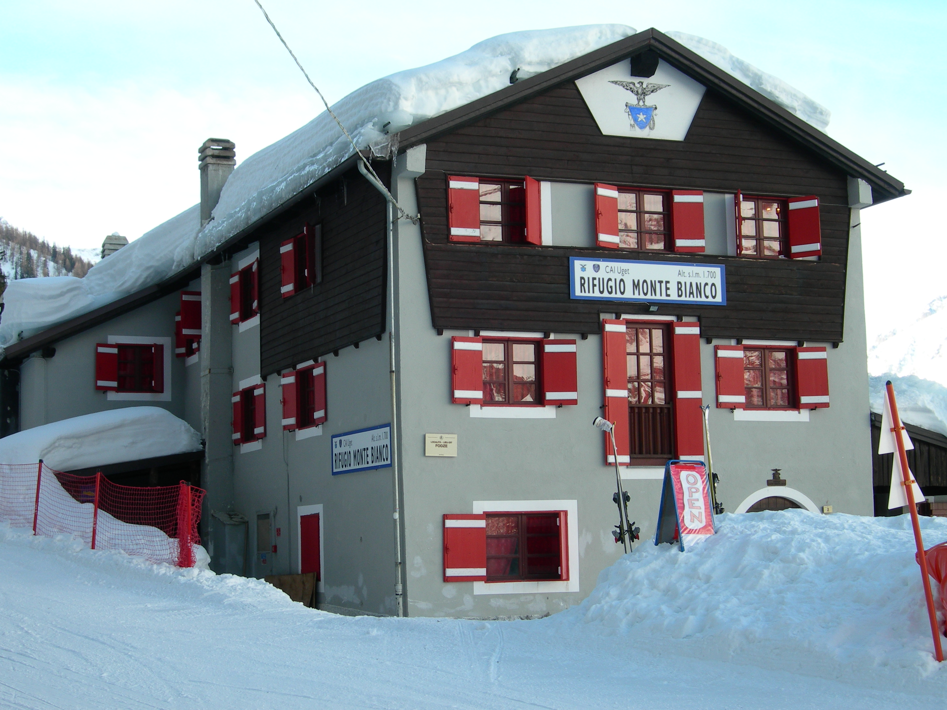 Rifugio Monte Bianco in val Veny a Courmayeur